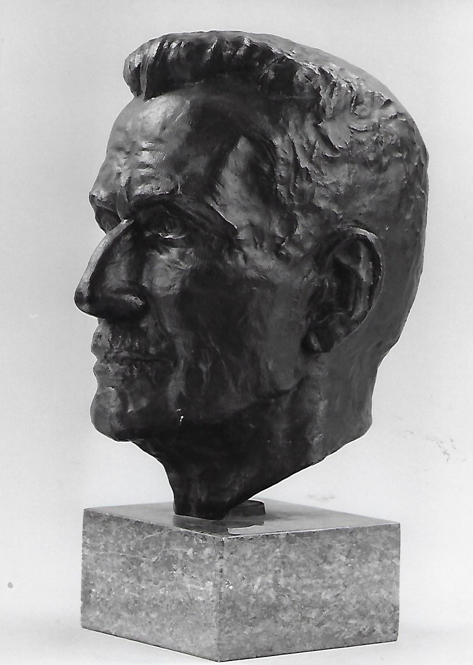 Bronzekopf von Herbert Meinhard Mühlpfordt